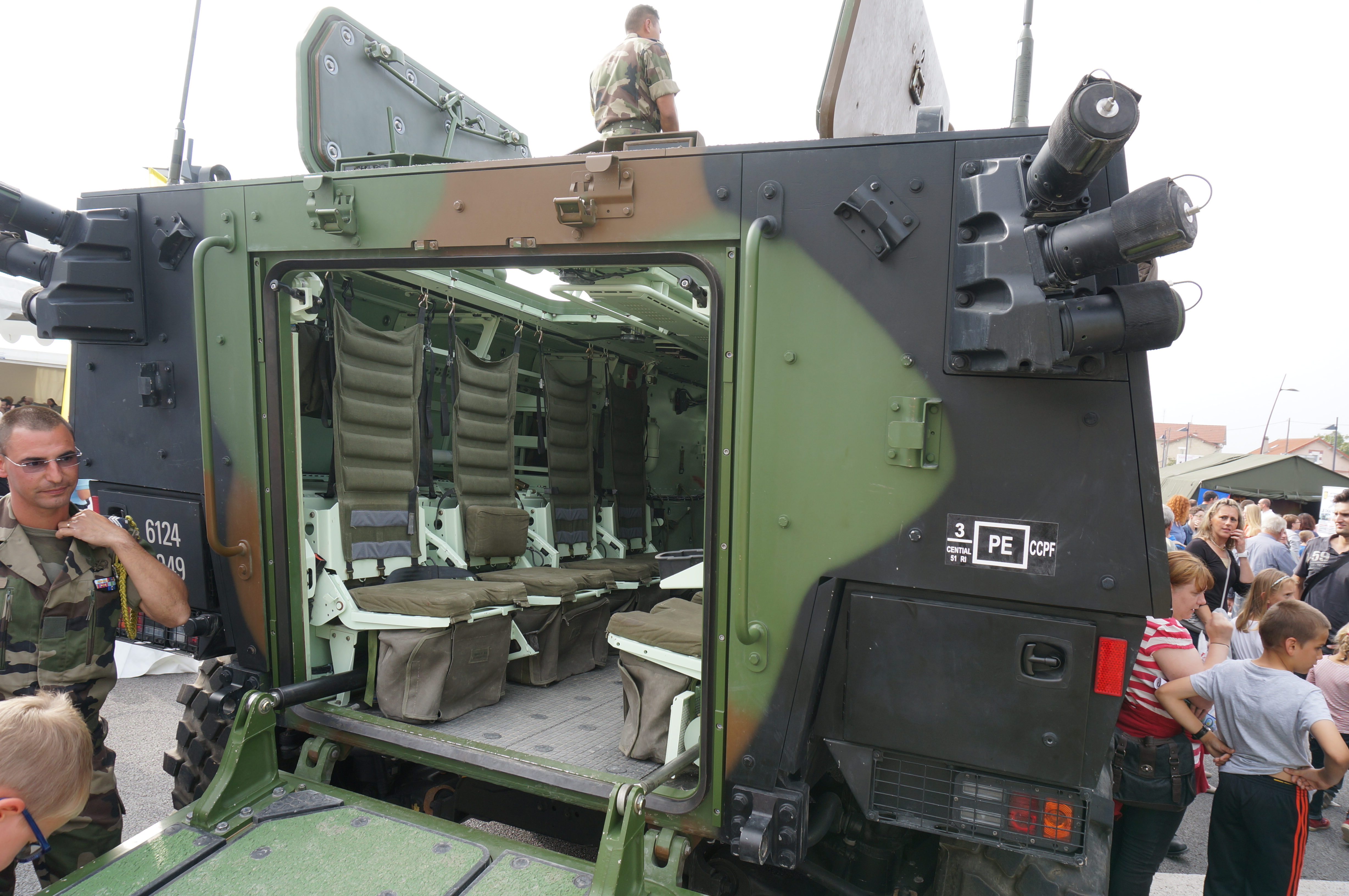 stand lors de la Foire de Châlons-en-Champagne 2014.